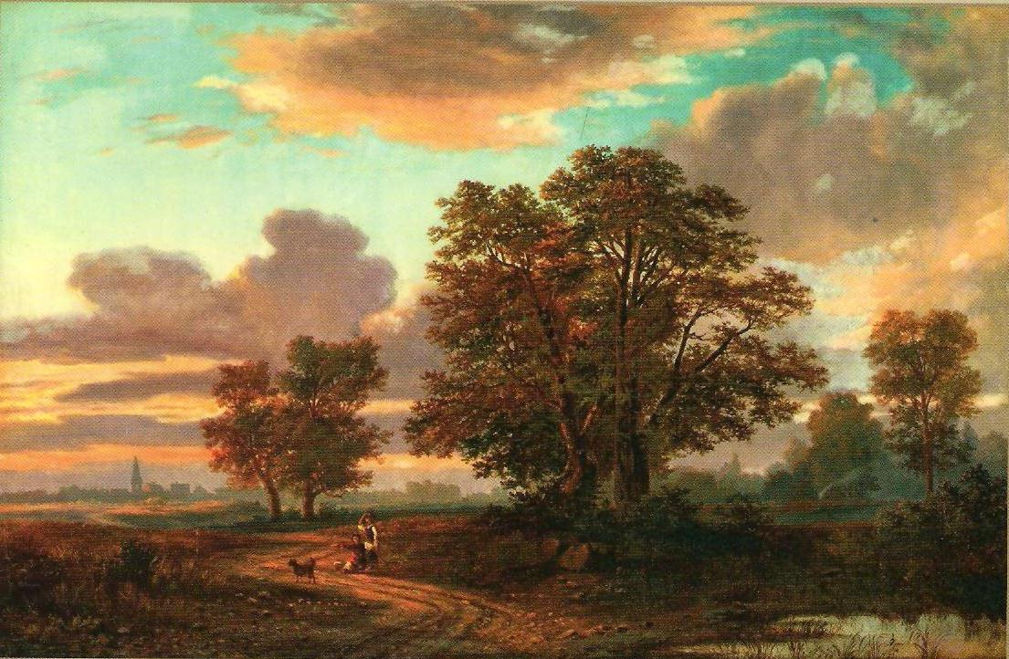 Картина Горавского Аполлинария Гиляриевича (1833-1900) "Вечер в Минской губернии", 1870-е.